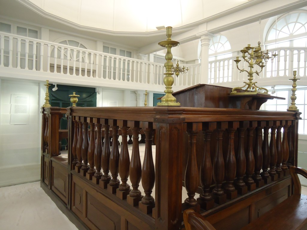 DSC08889 Israel